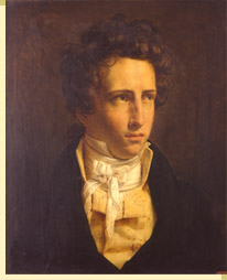 Baron Isidore Taylor (1789-1879)